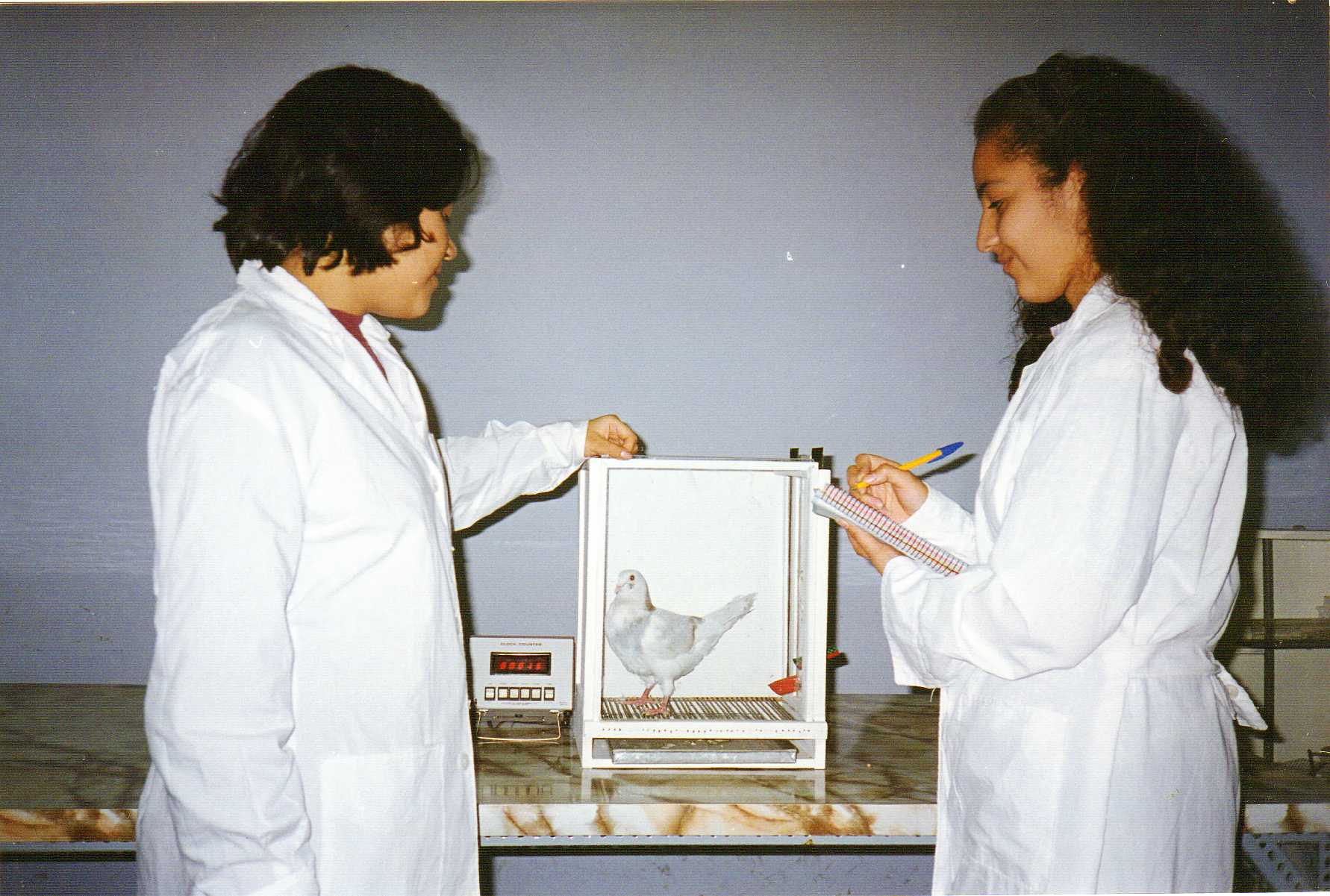 Experimento de condicionamiento en palomas utilizando una caja de Skinner construída artesanalmente. Fotografía demostrativa.